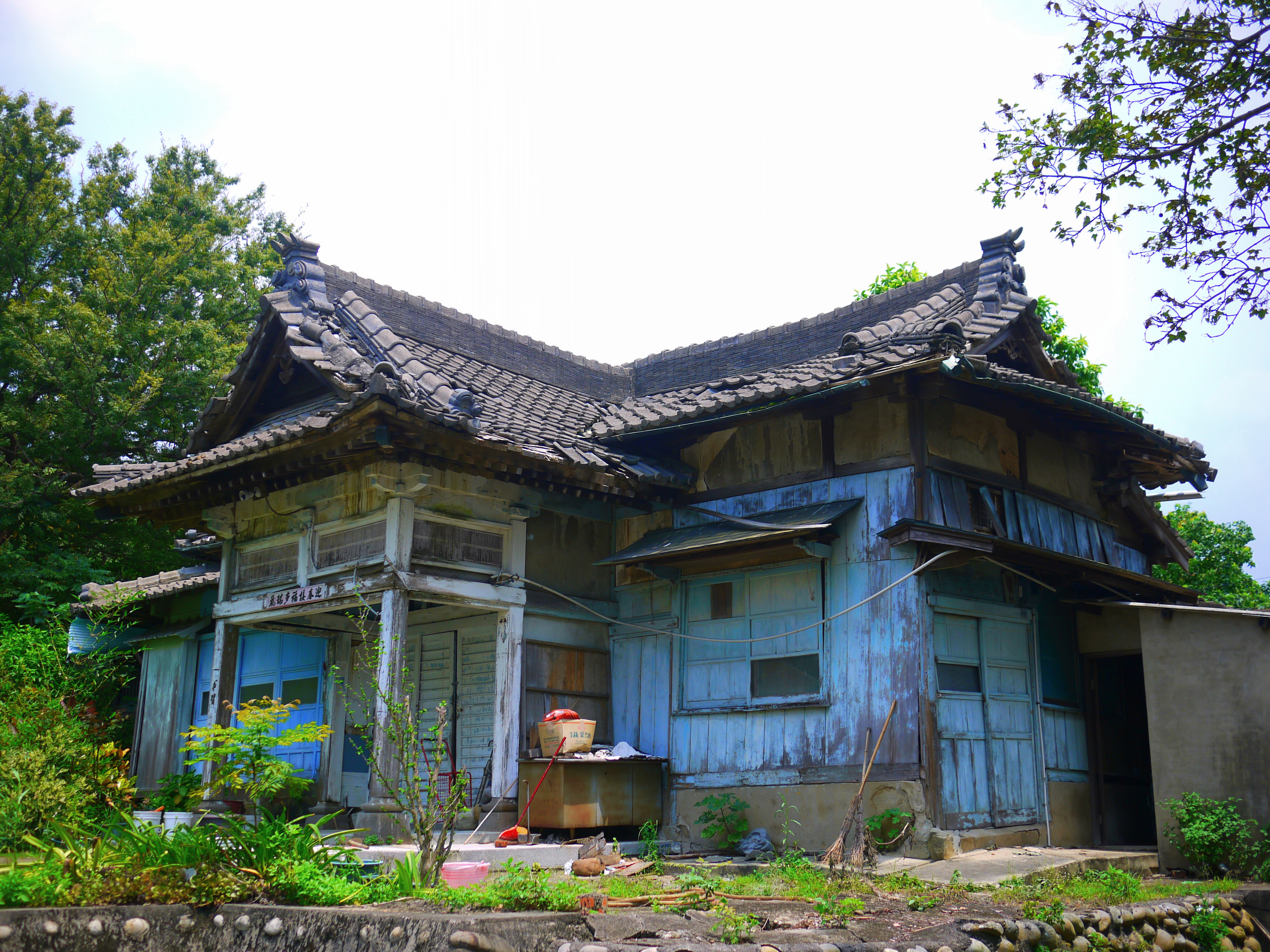 通宵神社社務所